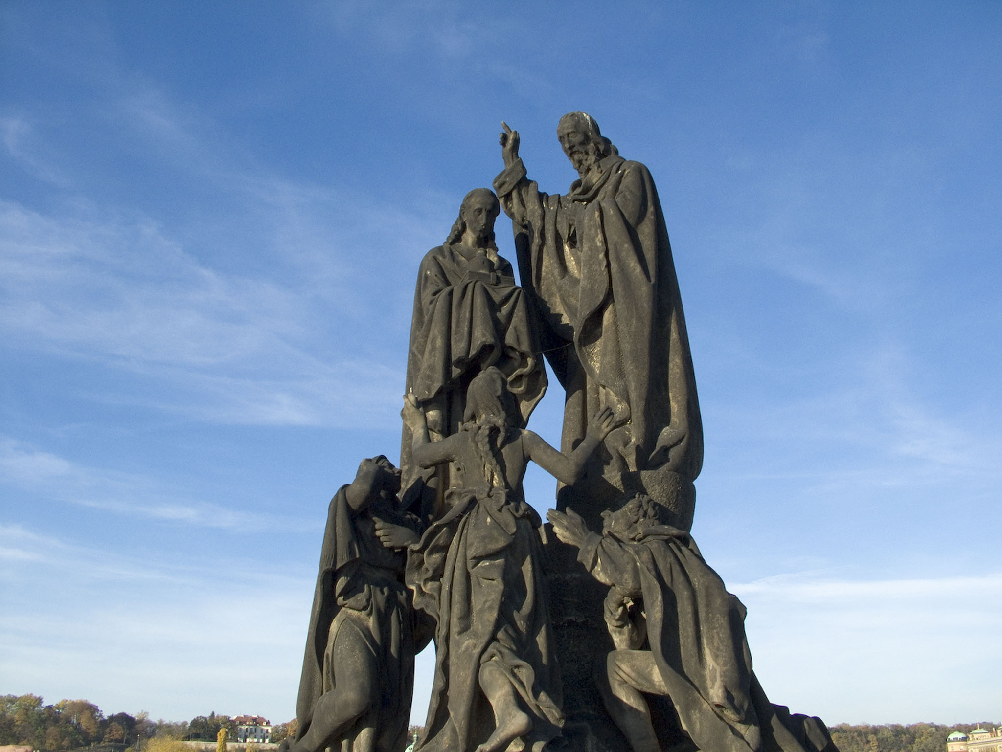 prague014